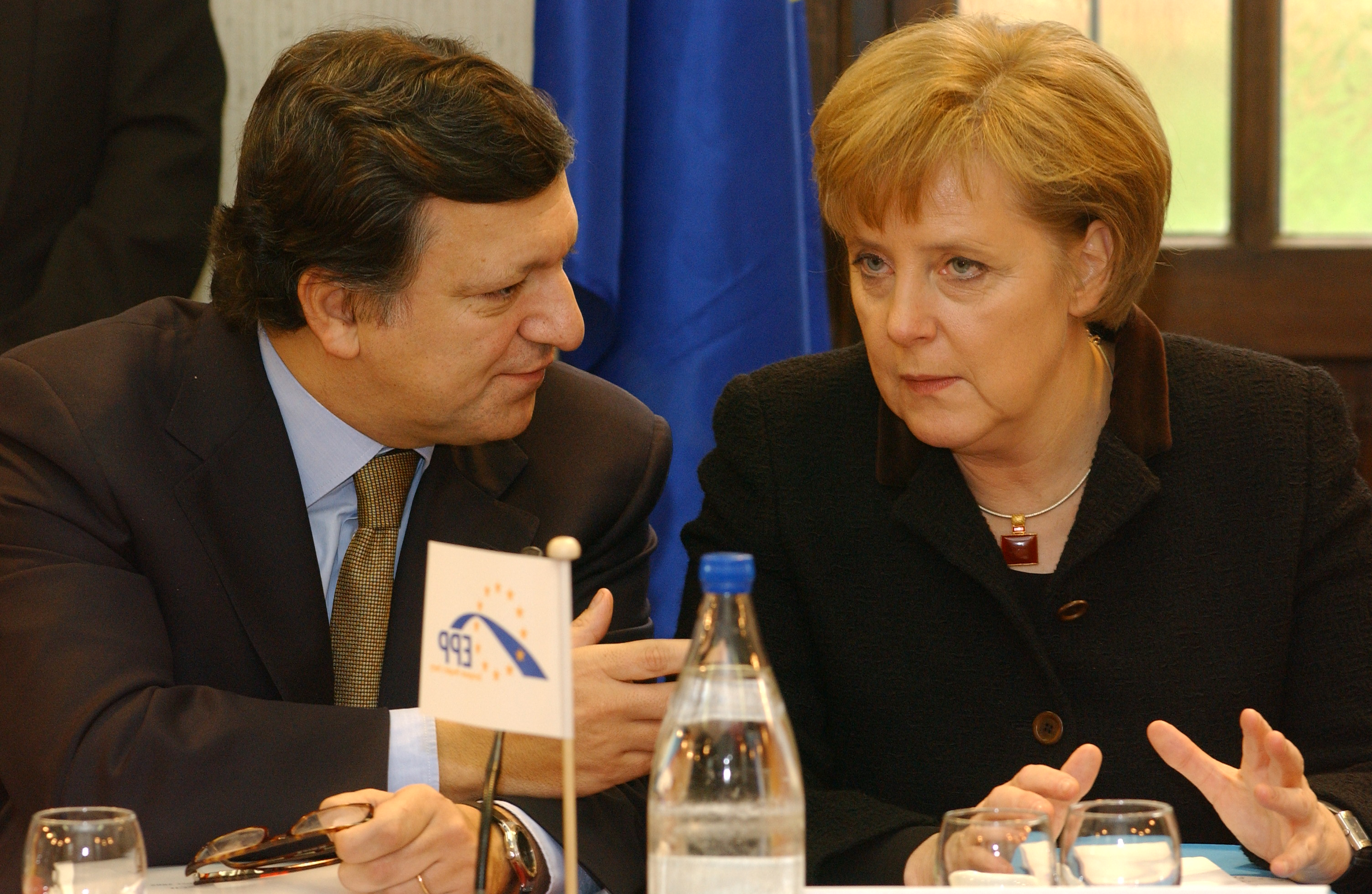 EPP Summit 15 December 2005